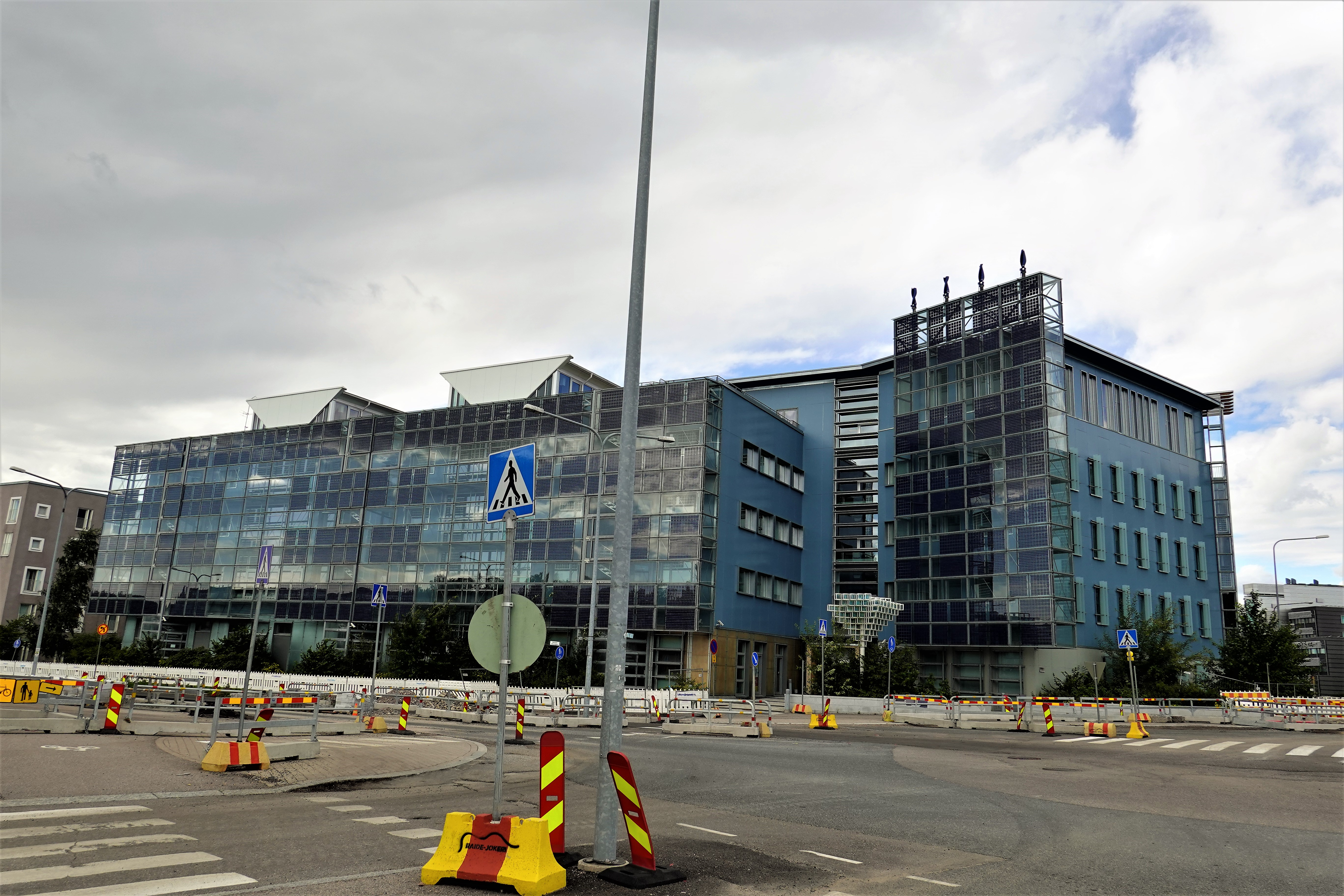 Kuva Helsingin Viikin ympäristötalosta, suunn. Kimmo Kuismanen, valm. 2011.